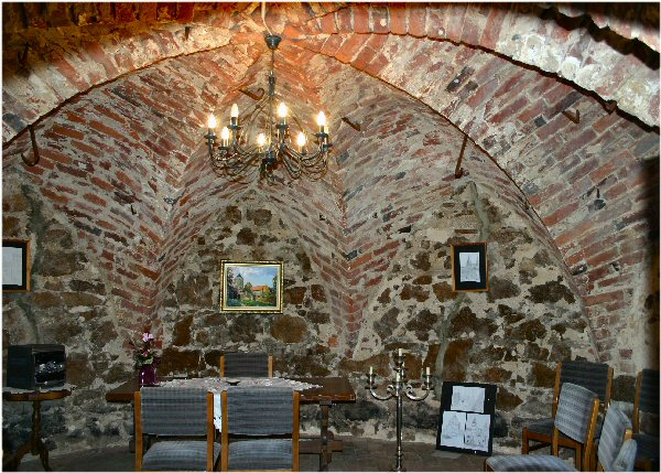 Schloss Hohenthurm, Sachsen-Anhalt - Innenraum